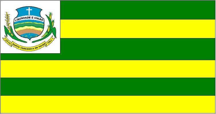 Bandeira 2